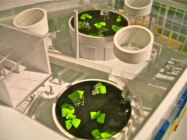 Ørestad Gymnasium in Ørestad Copenhagen, Denmark. Designed by 3XN